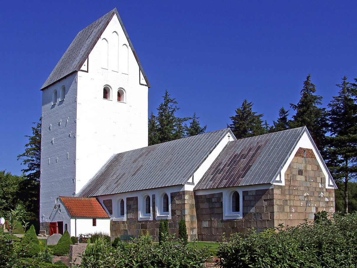 Hjardemål kirke (Thisted) fra sydøst